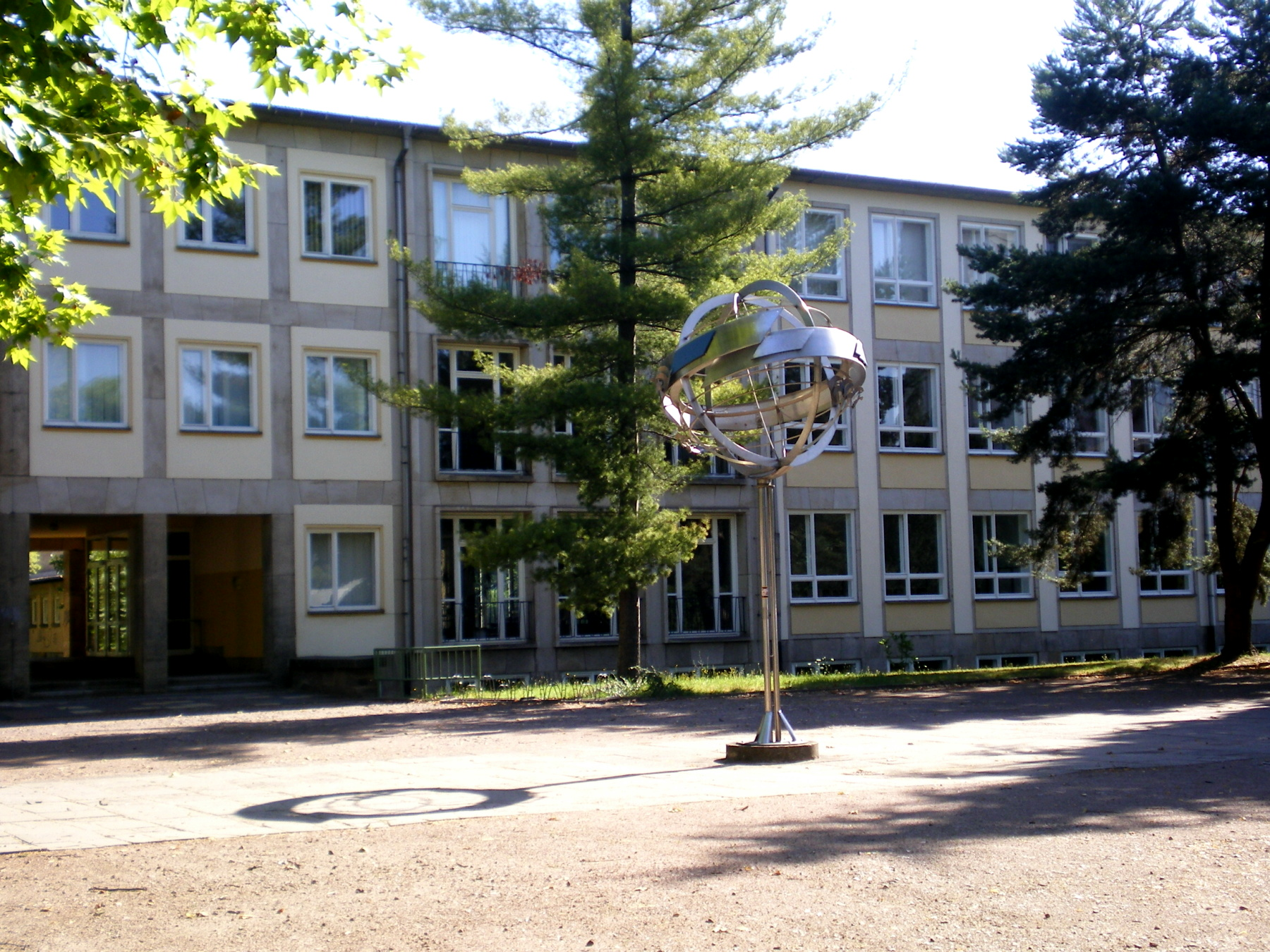 Metallstele vom Dresdner akademischen Bildhauer Wilhelm Landgraf in Dresden Schule Fetscher Straße.